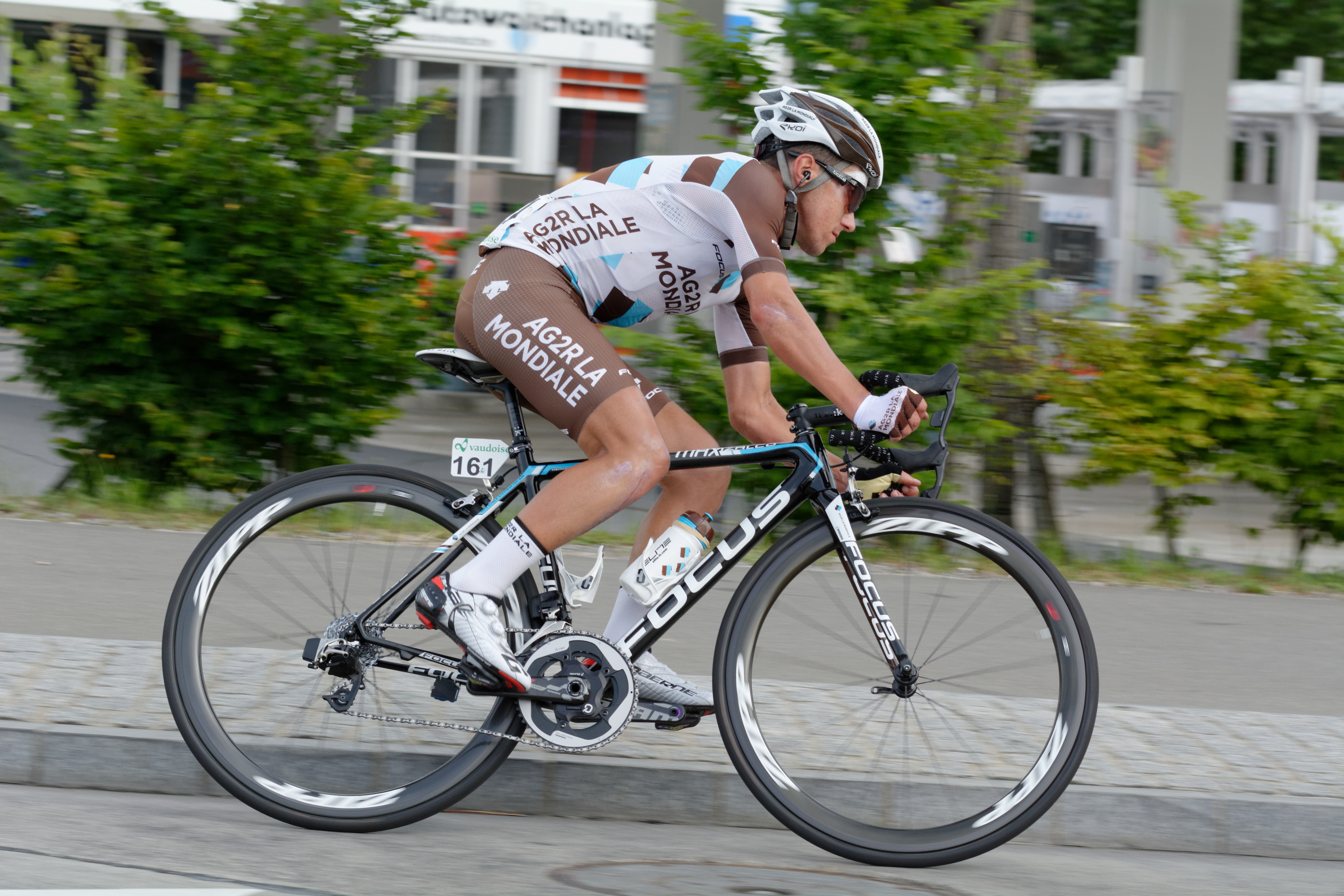 D71_0434_DxO